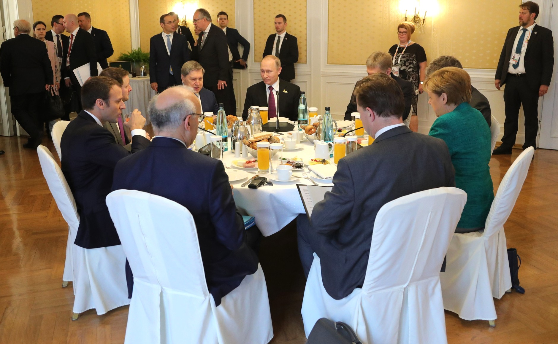 Рабочий завтрак Президента России Владимира Путина с Федеральным канцлером Германии Ангелой Меркель и Президентом Франции Эммануэлем Макроном